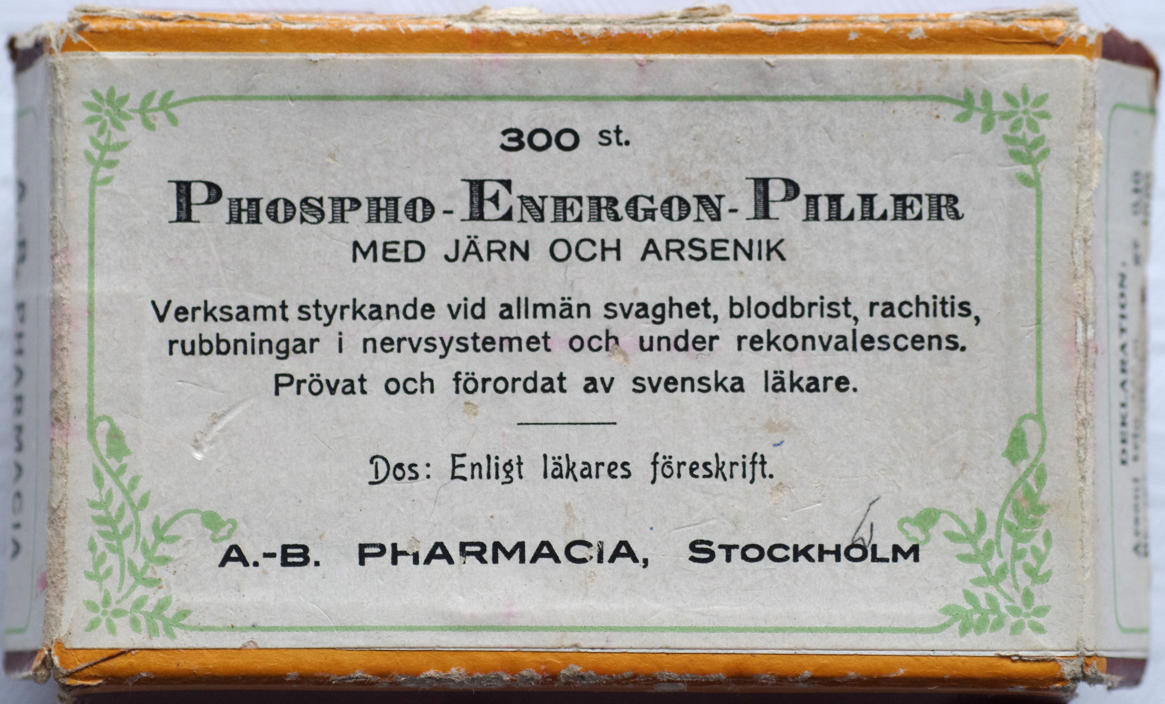 Ask med phospho-energon-piller